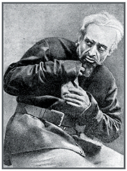 Барон — Г. Бакланов. Большой театр, 1906